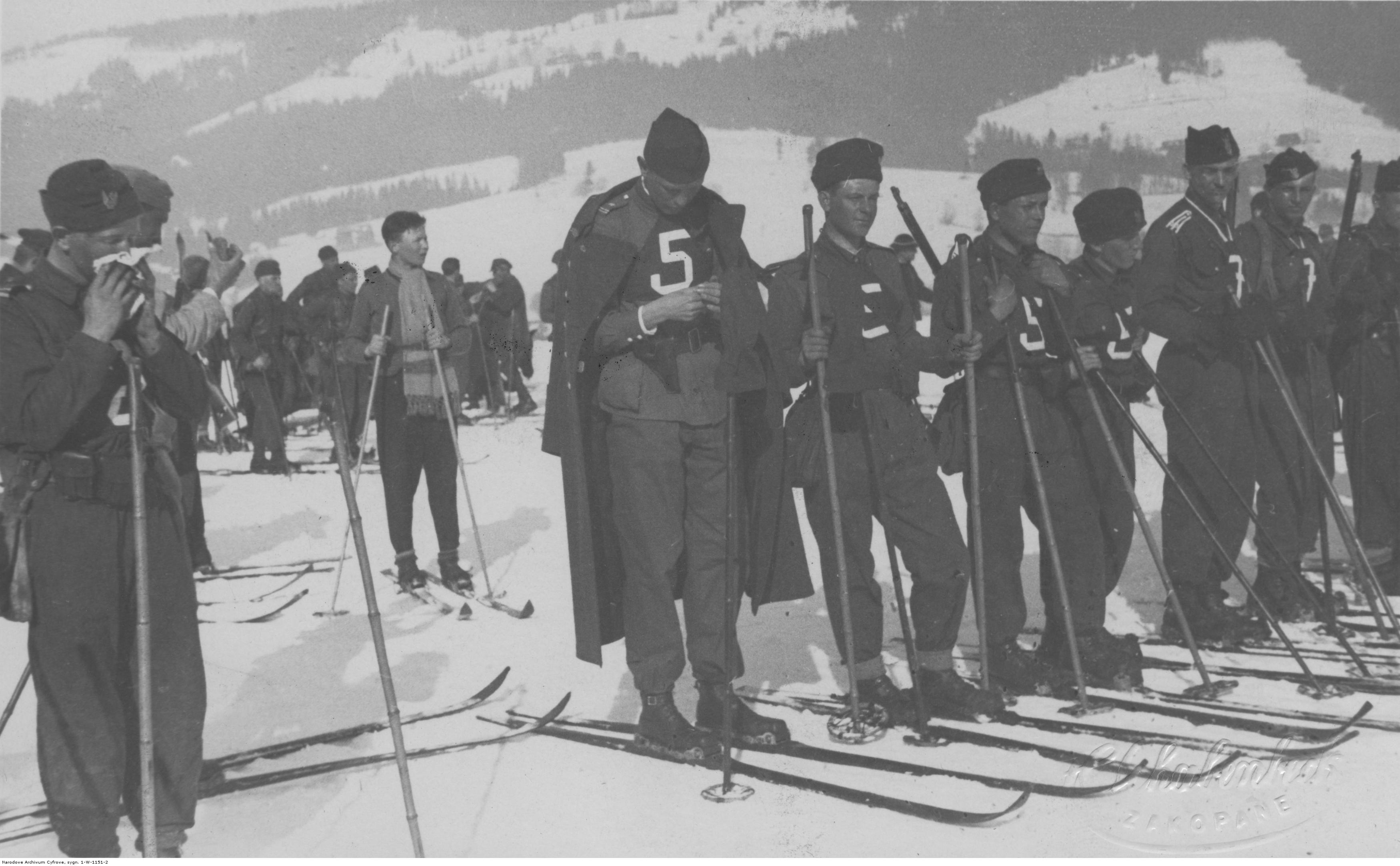 Szkoła wysokogórska przy 21 Dywizji Piechoty Górskiej w Zakopanem. Zawody dywizyjne - zawodnicy przed startem do biegu patroli na nartach. Widoczny m.in. mjr Wilimowski. Koncern Ilustrowany Kurier Codzienny - Archiwum Ilustracji. Sygnatura: 1-W-1151-2